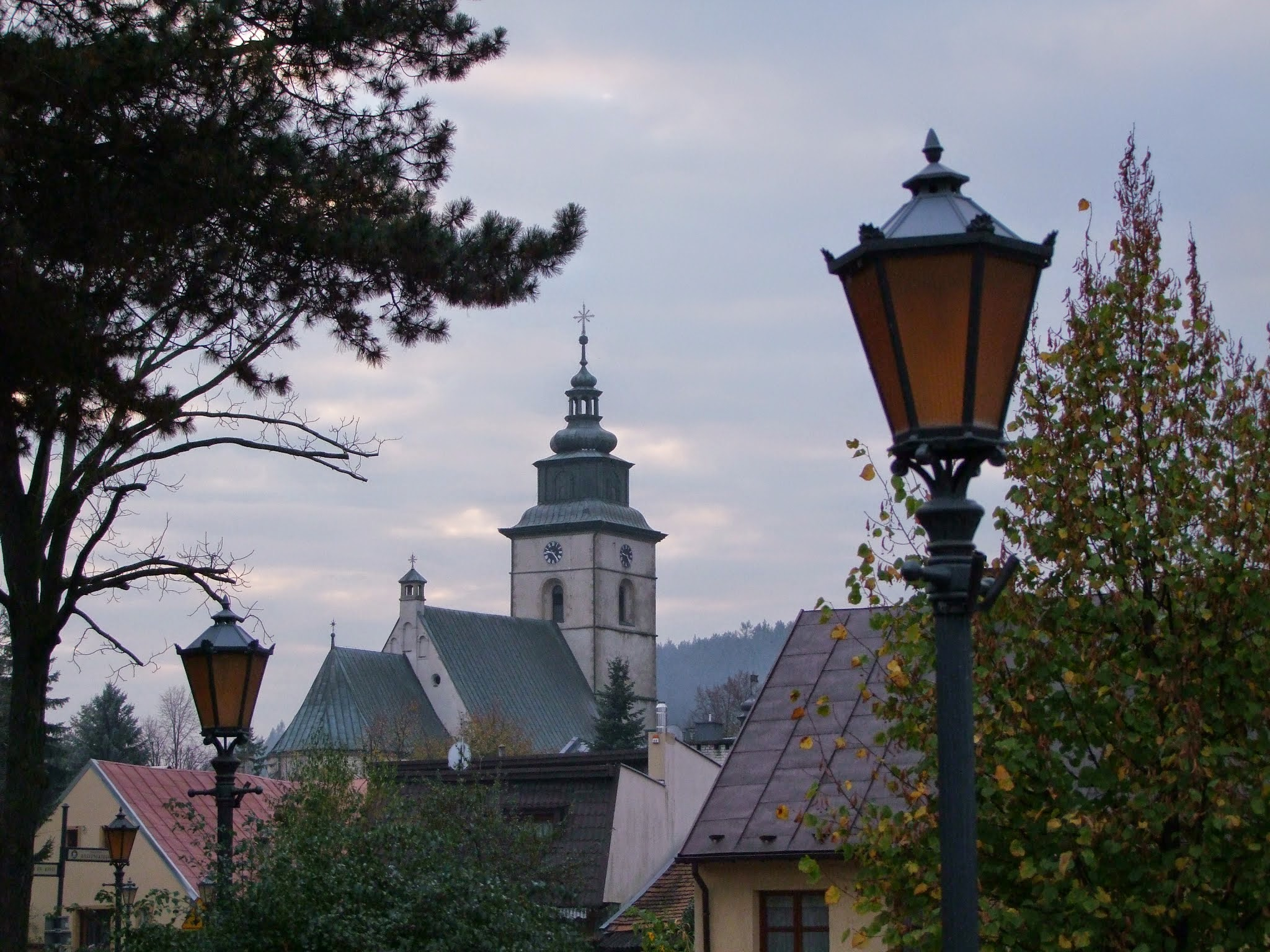 Stary Sącz, Poland